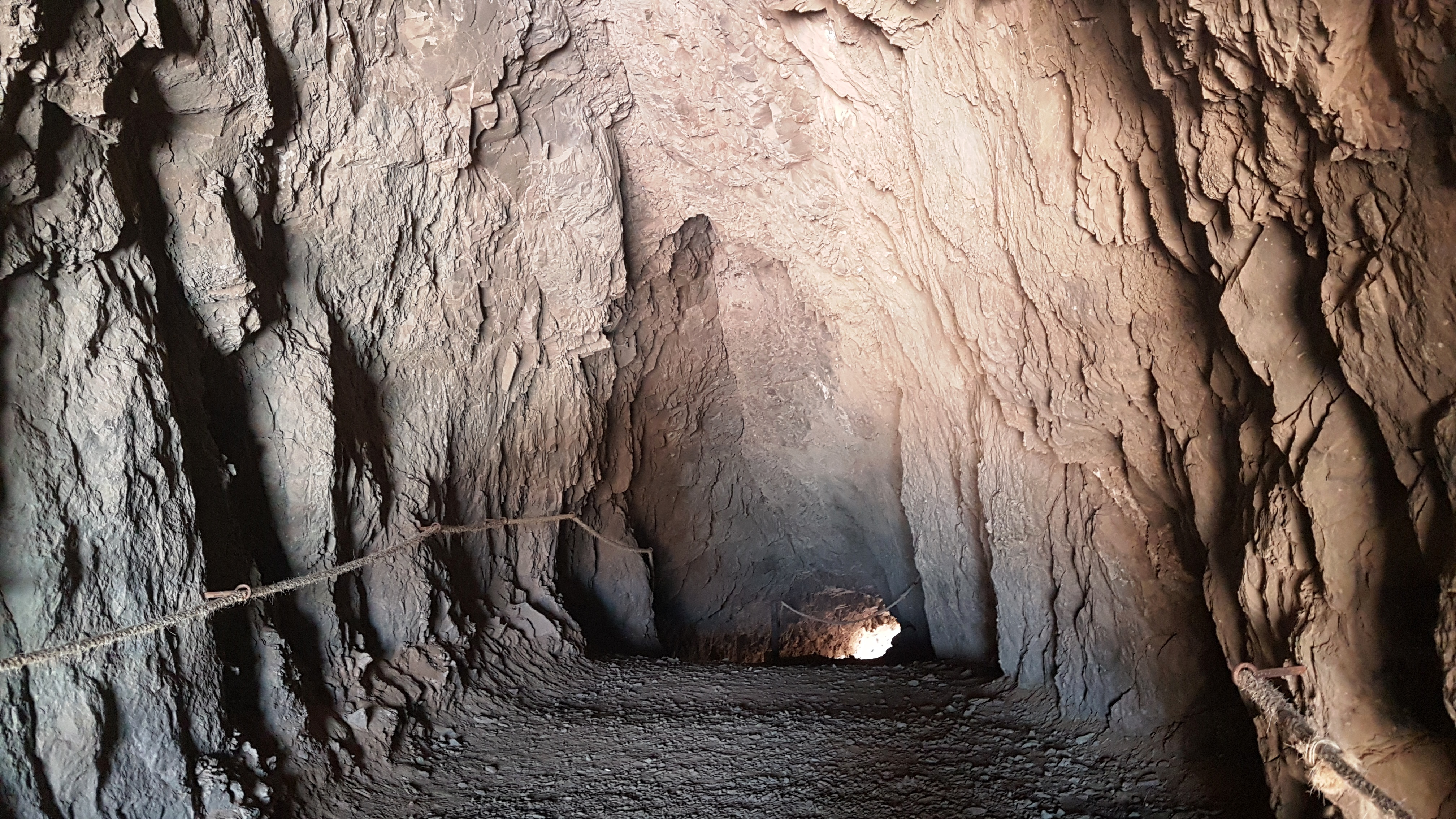 Cueva de anzota. Interior de la primera cueva.